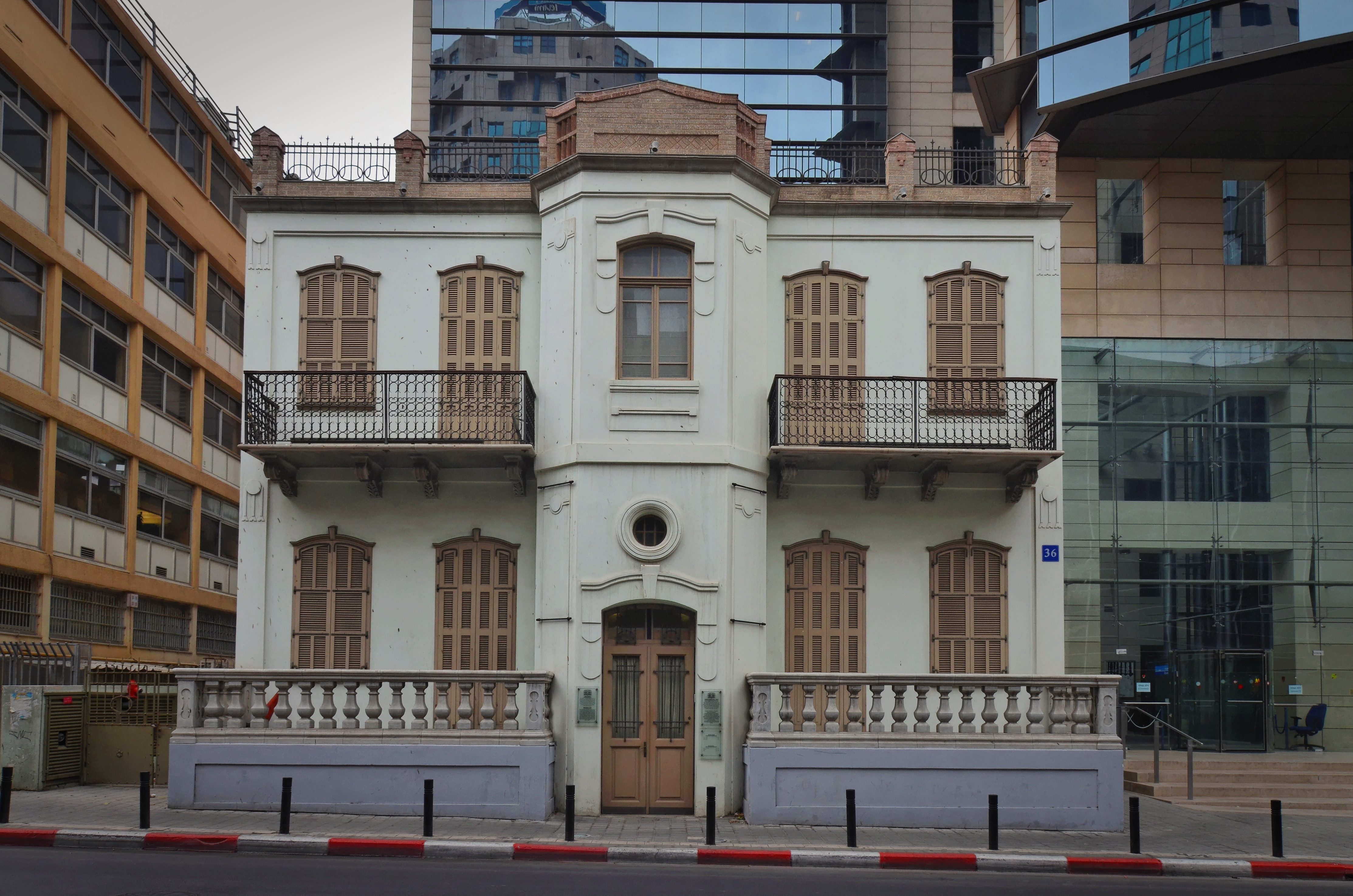 בית מני